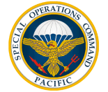 Emblem des United States Special Operations Command Pacific (SOCPAC)